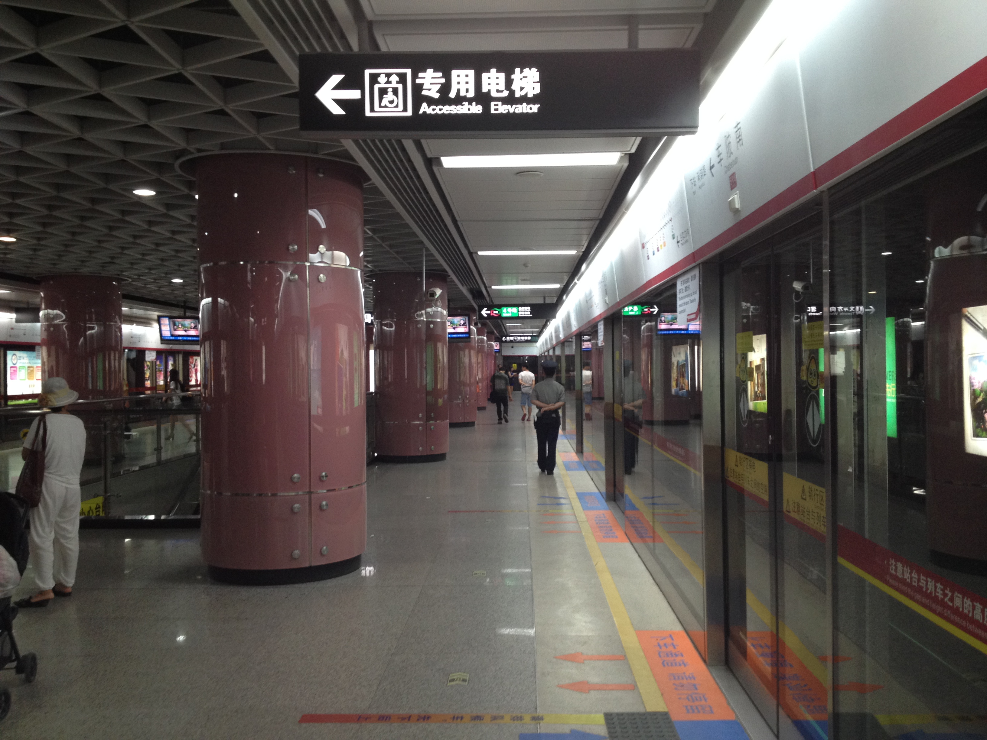 广州地铁5号线车陂南站站台